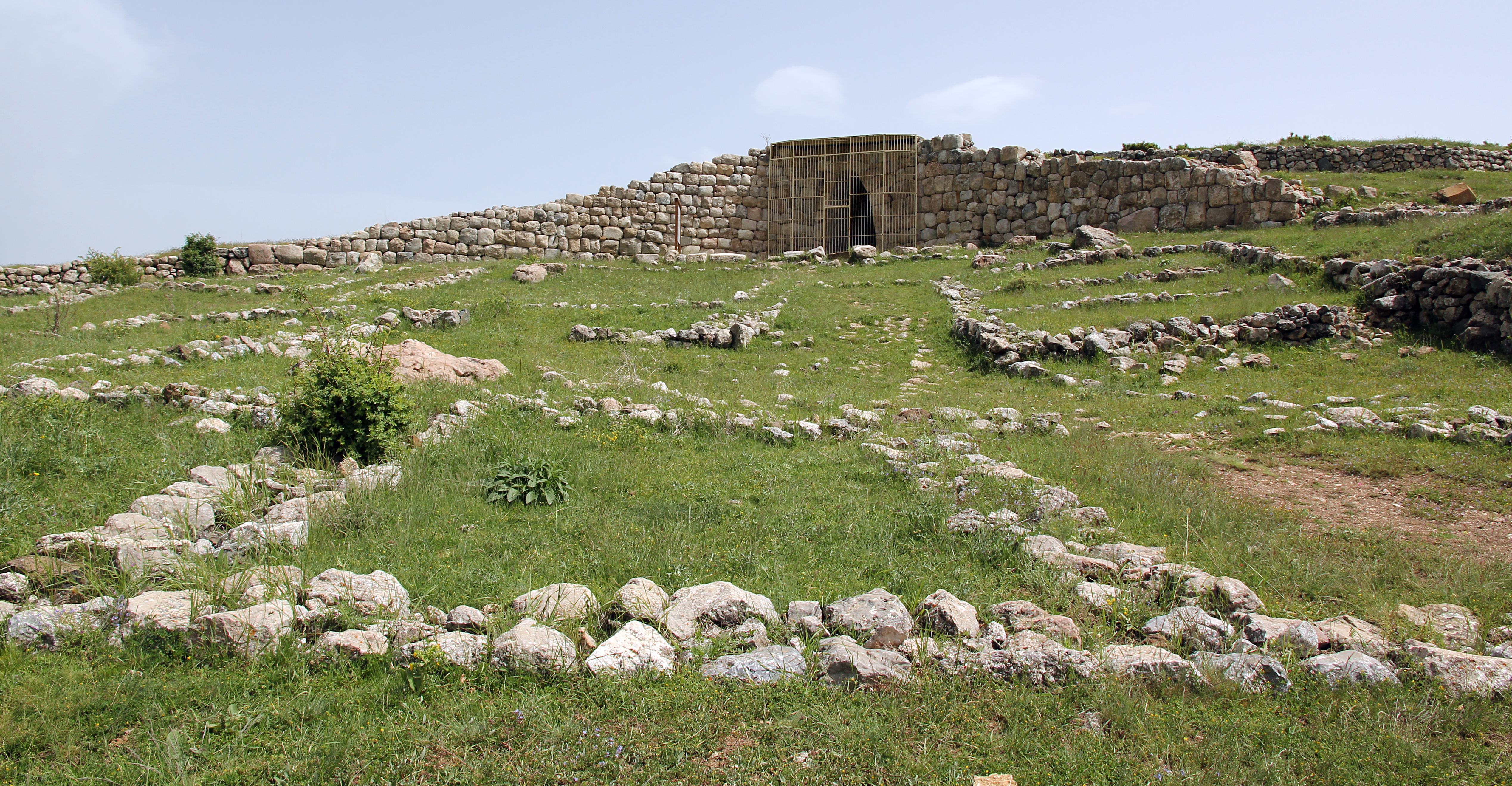 Grundmauern der Südburg von Ḫattuša mit Hieroglyphenkammer, Zentraltürkei